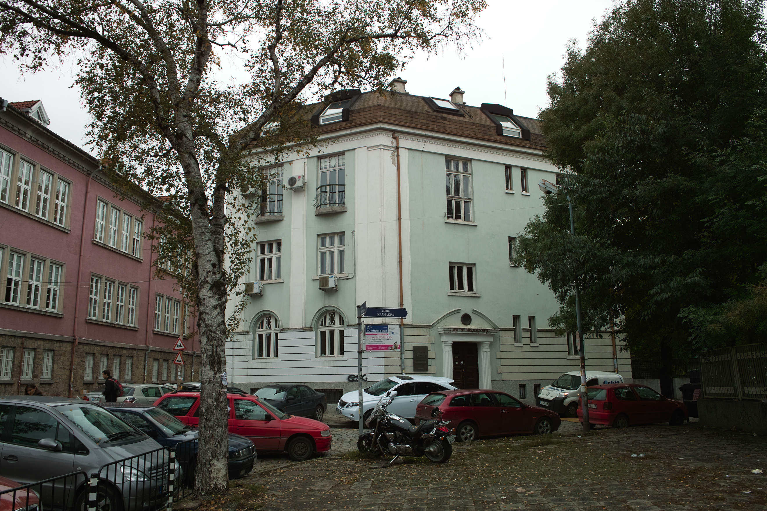 Офисът на New Moment в София. Ул. Калиакра 5